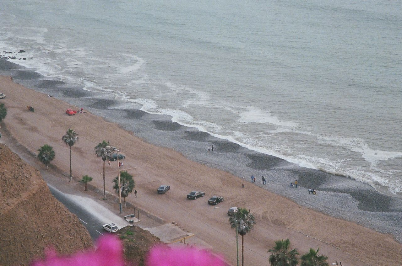 Miraflores beach - Lima, Peru